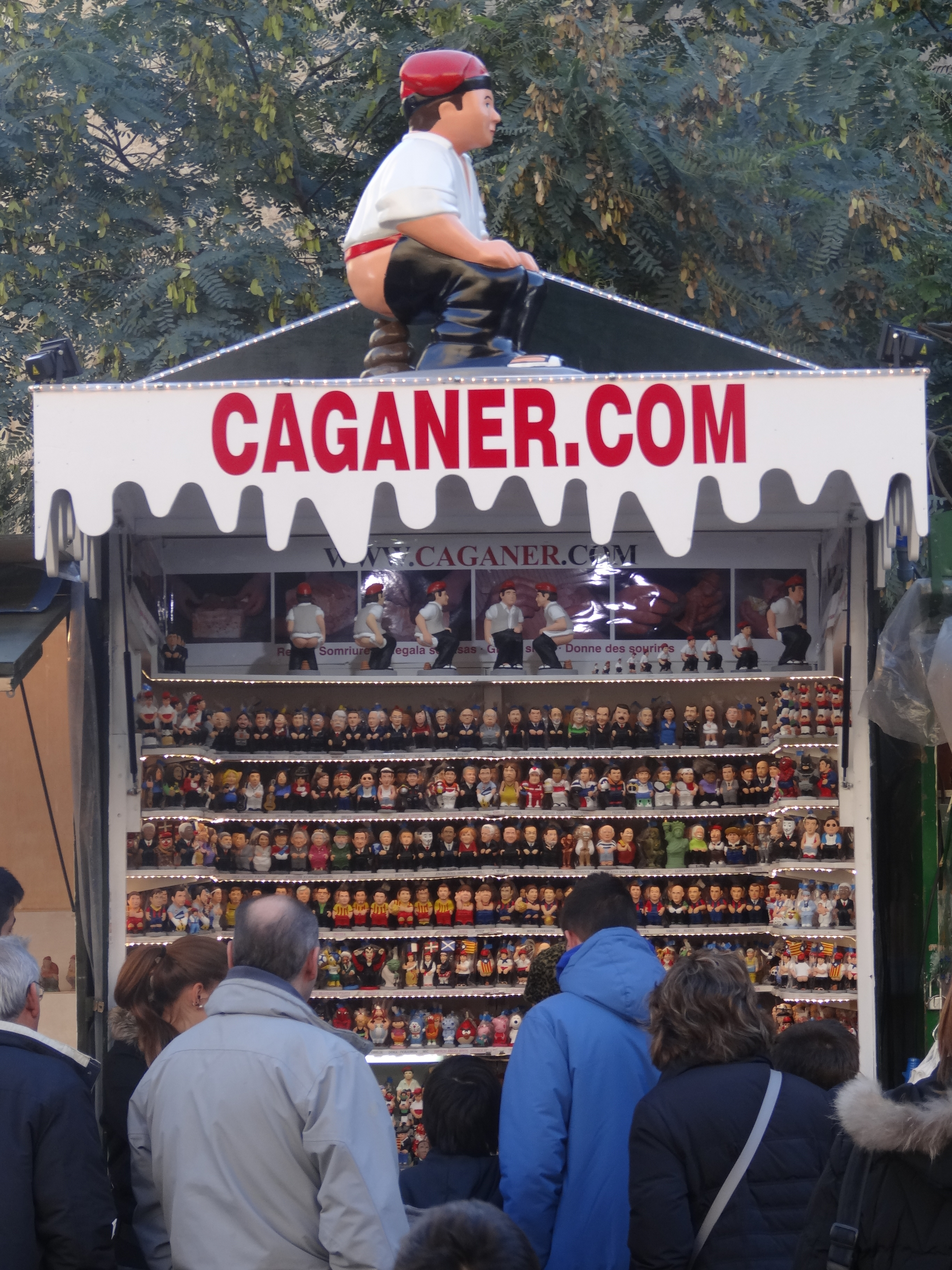 Parada de a la fira de Santa Llucia - Barcelona - Desembre de 2013